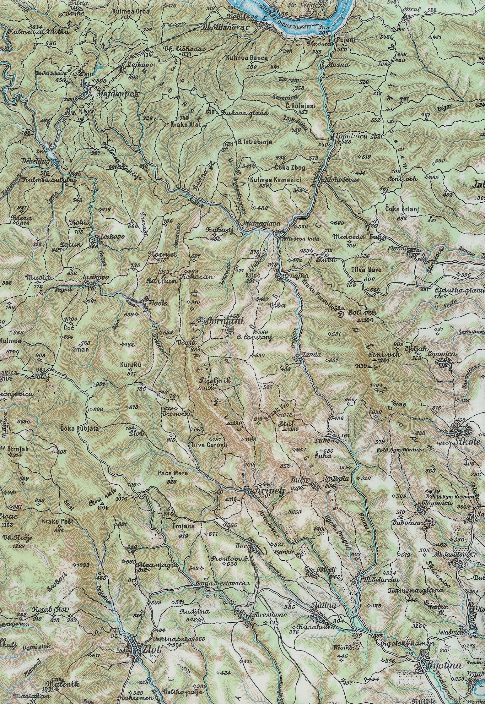 Das Gebiet östlich von Laznica in Serbien, Gemeinde Majdanpek, Kreis Bor